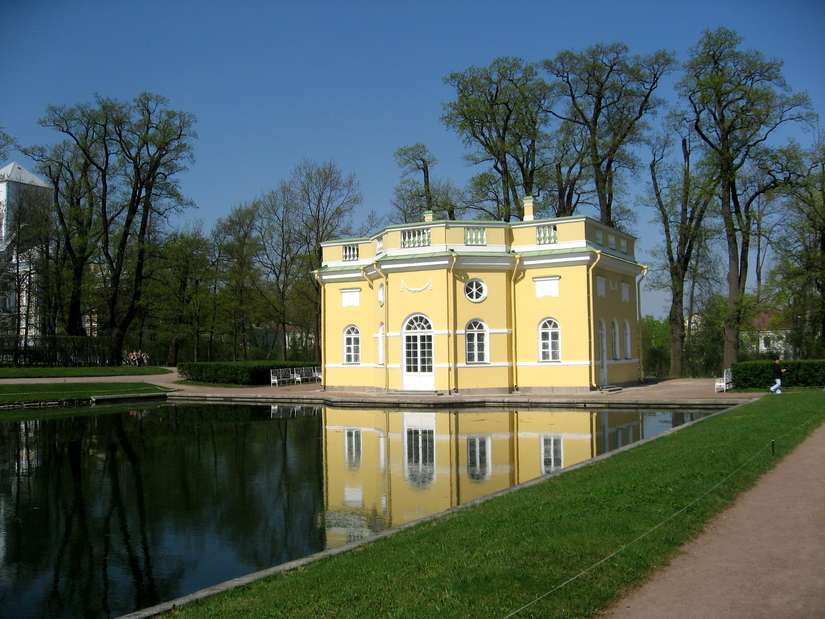 Kateřinský palác, zahrady